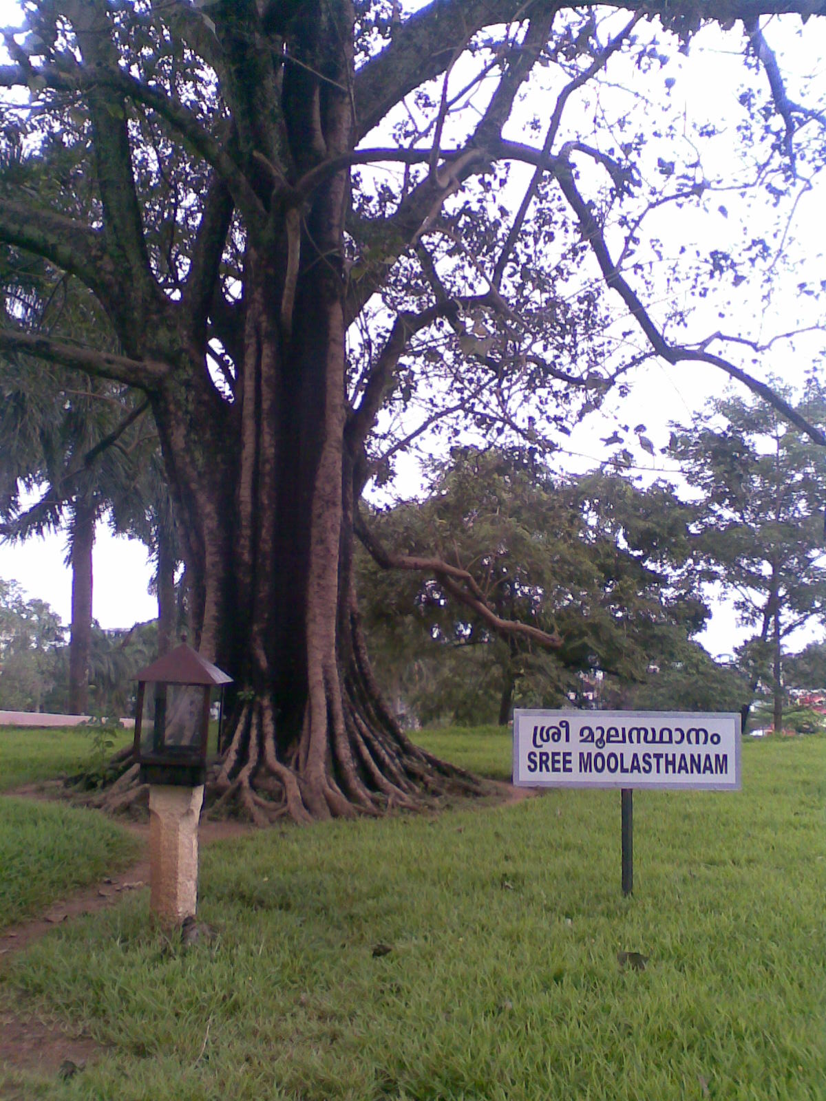 Sreemoola sthanam